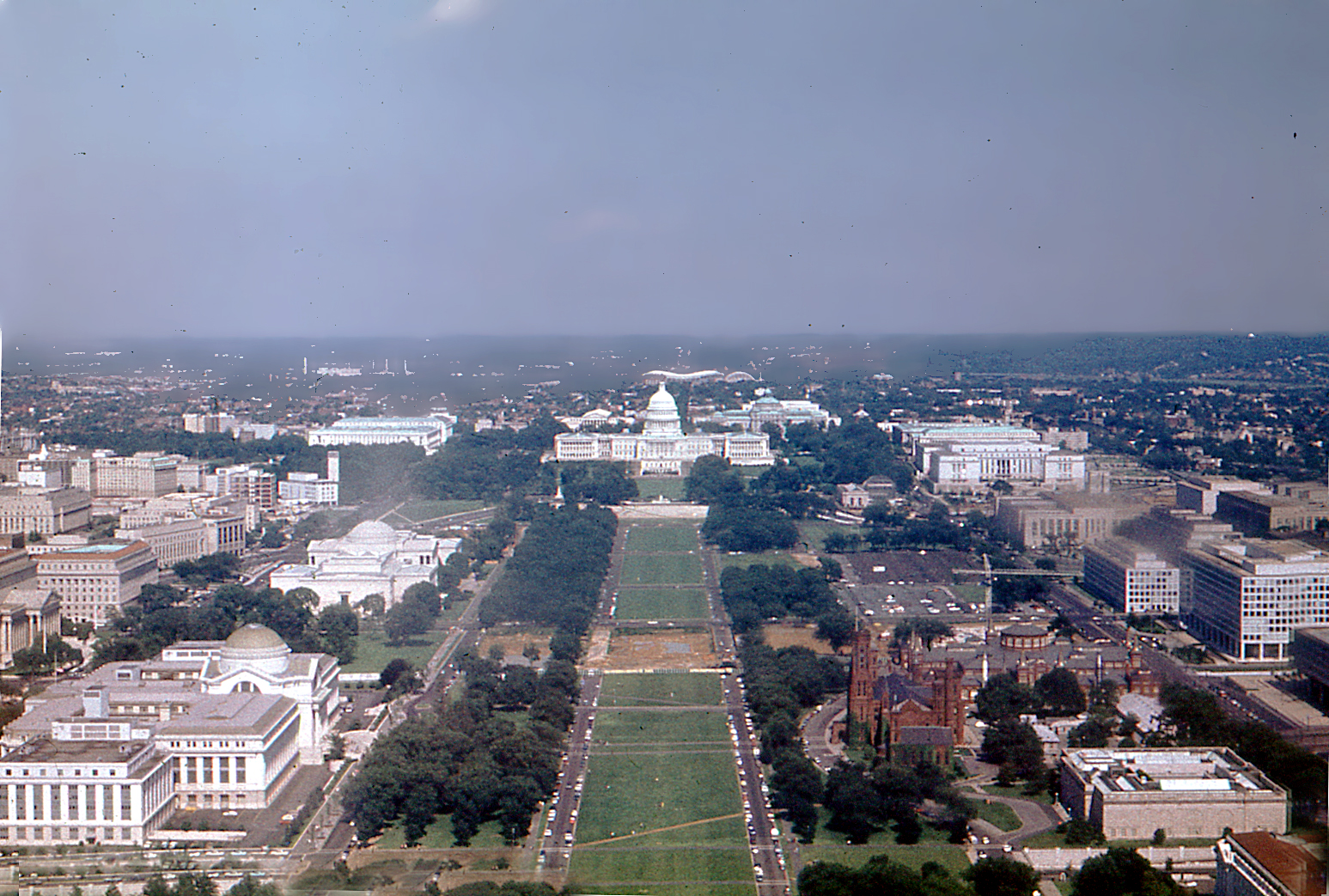 Вид с монумента Вашингтона в направлении на Капитолий